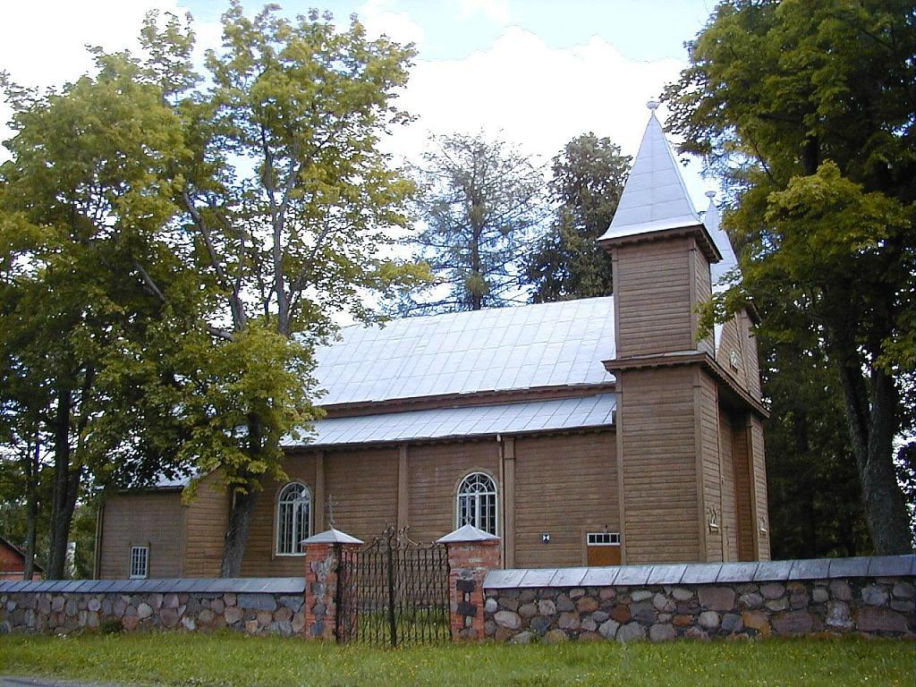 Ciblas baznīca 2001-08-12